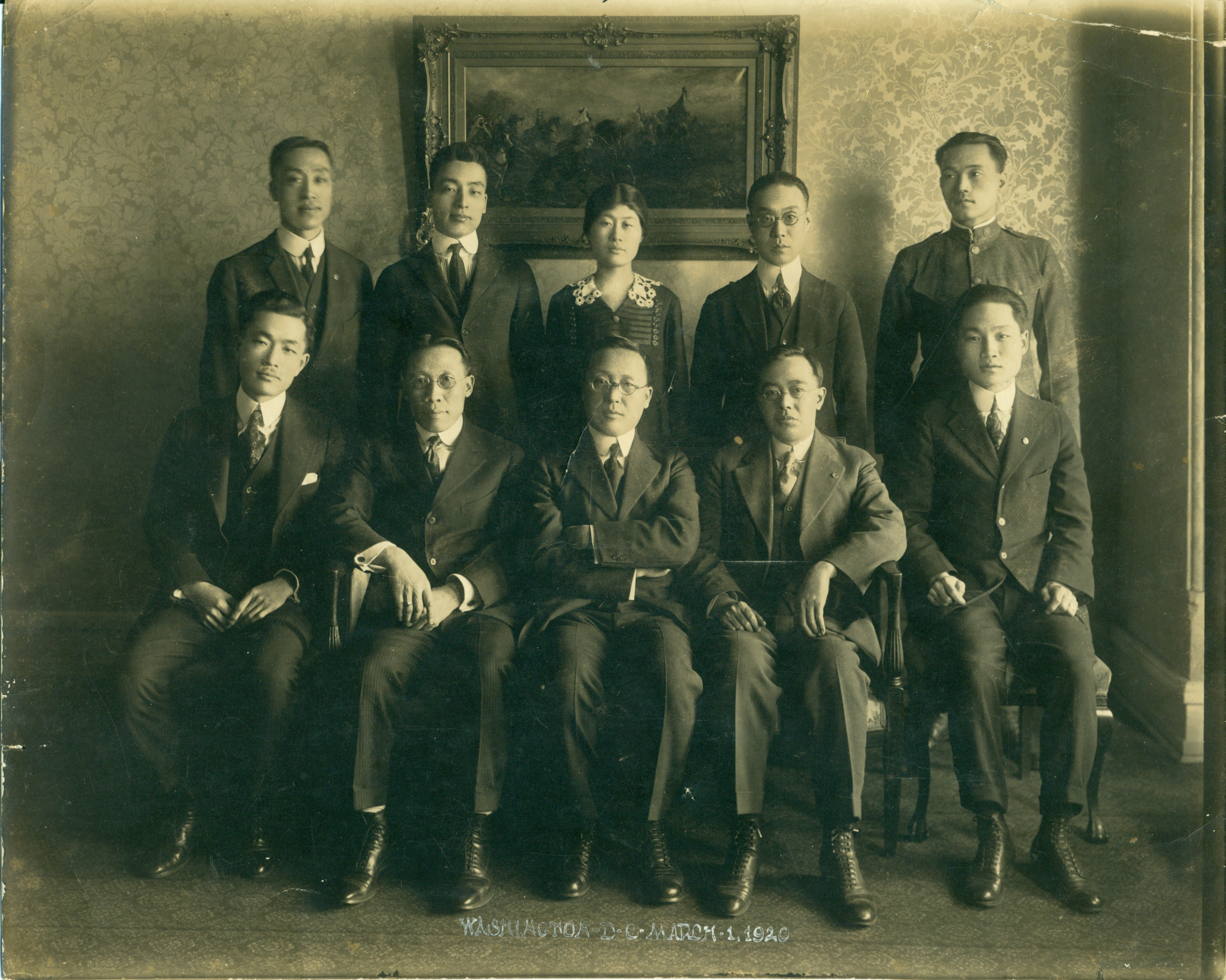 1920년 3월1일 미국 워싱턴에서 3·1절 1주년 기념식을 마치고 기념촬영을 한 임정 구미위원부 간부들.(앞줄 가운데가 이승만 박사, 그 오른쪽이 김규식 박사)